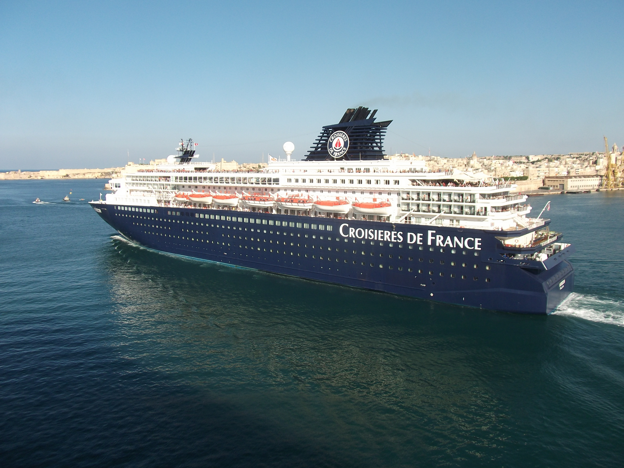 MS Horizon vor Valetta / Malta IMO Number: 8807088 MMSI Number: 249727000 Callsign: 9HYZ9 Length: 207 m Beam: 32 m